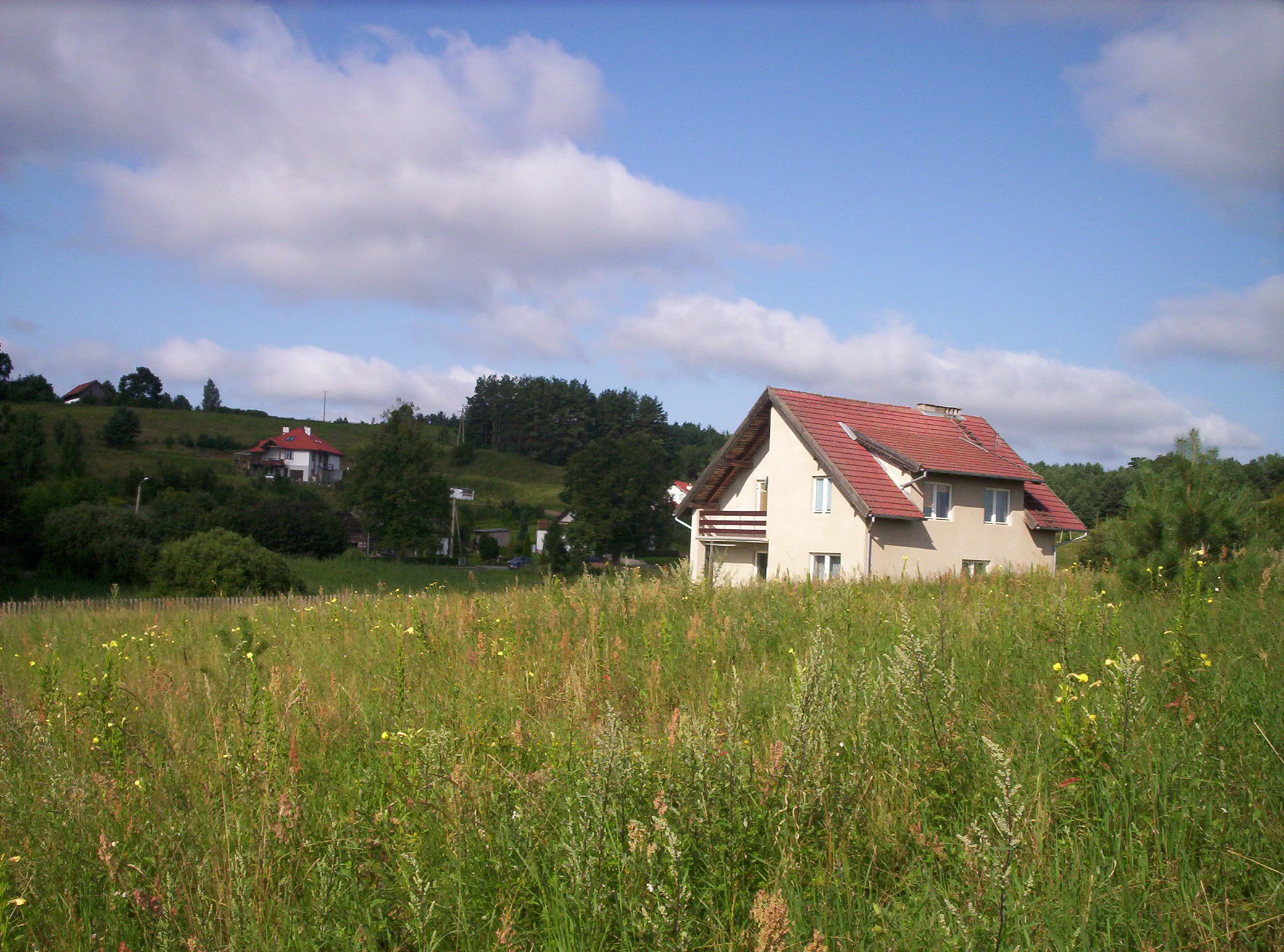 Widok na domy we wsi Ruś koło Olsztyna